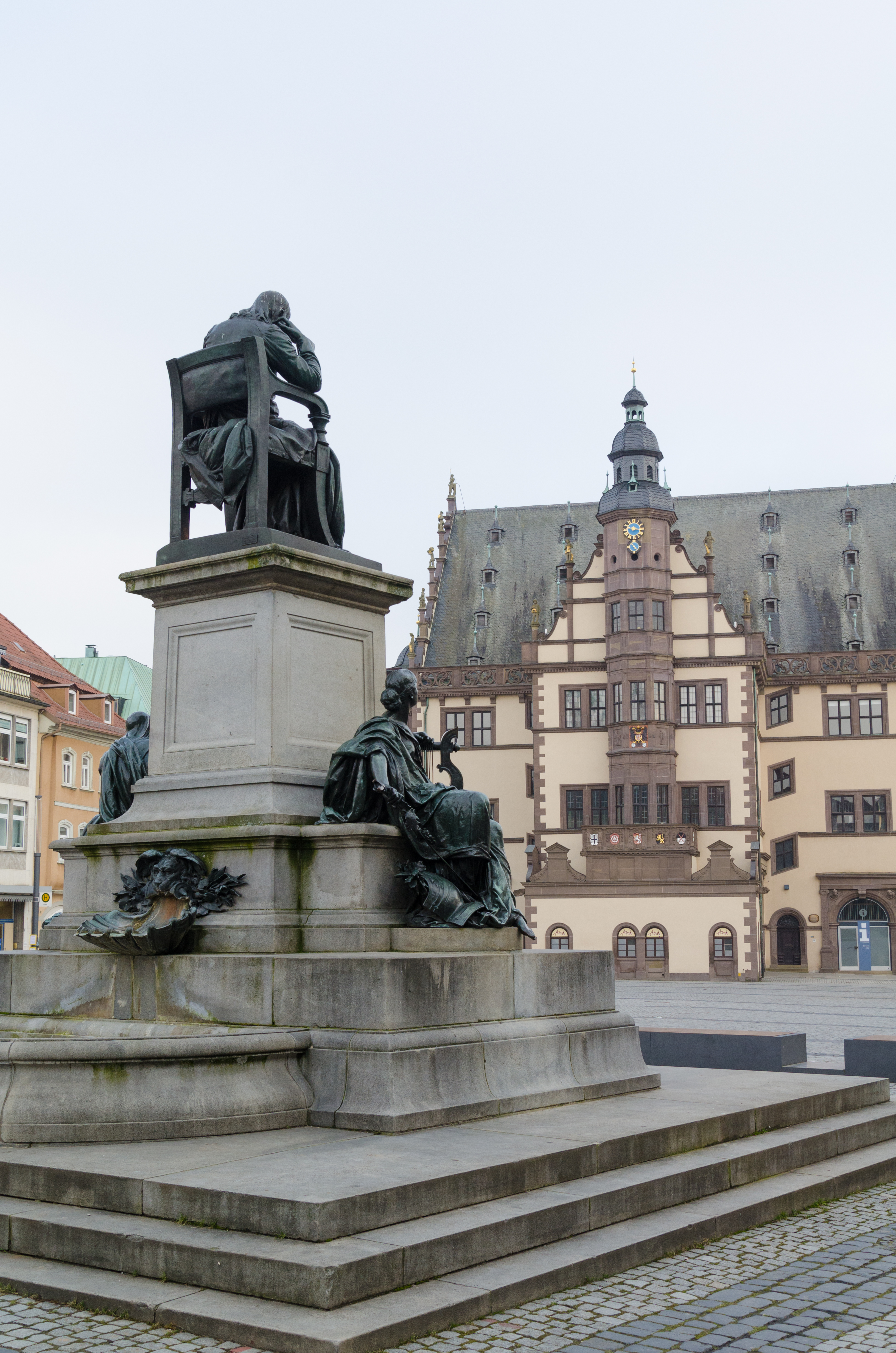 Schweinfurt, Markt, Denkmal für Friedrich Rückert